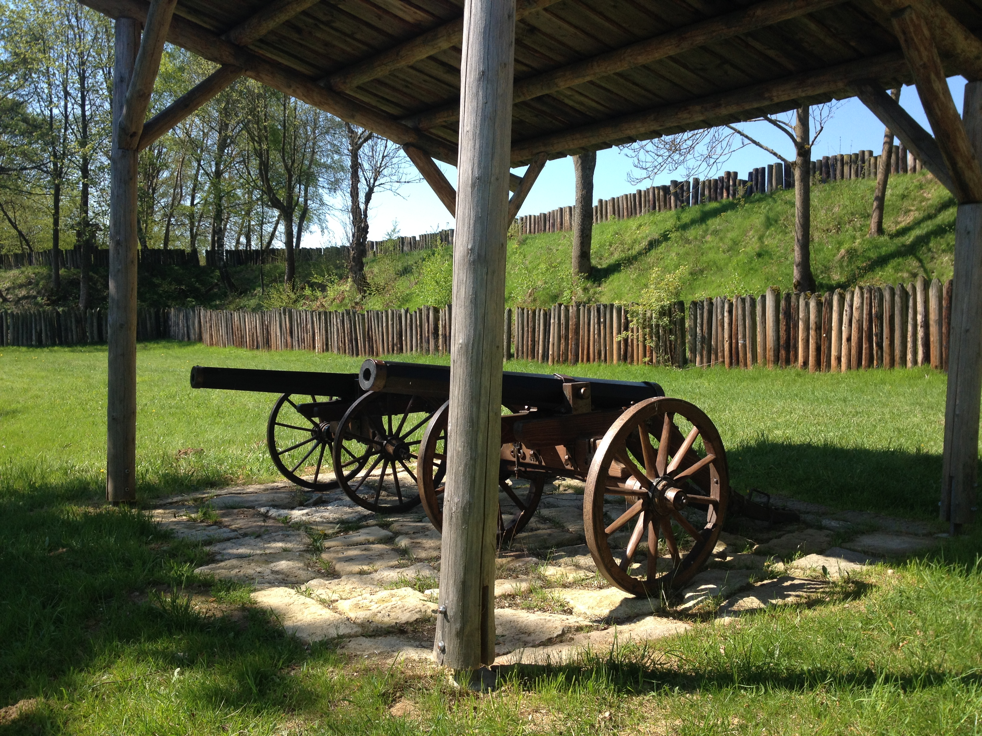 Am östlichen Ende dieser Schwedenschanze führt in Rading ein kurzer beschildeter Rundgang durch ein renoviertes Wallstück mit Palisaden. Dort befindet sich auch die im Vordergrund abgebildeten zwei Kanonen